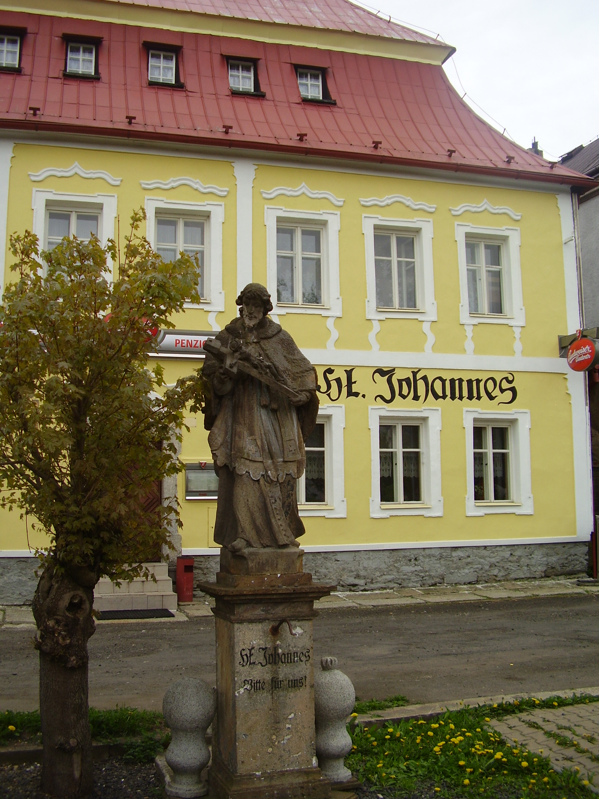 Gasthaus (ehemaliges Gemeindehaus) in Loučná pod Klínovcem (Böhmisch Wiesenthal), Tschechien